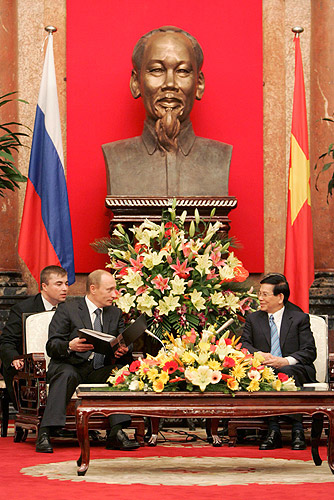 Vladimir Putin and Nguyễn Minh Triết in Vietnam in 2006